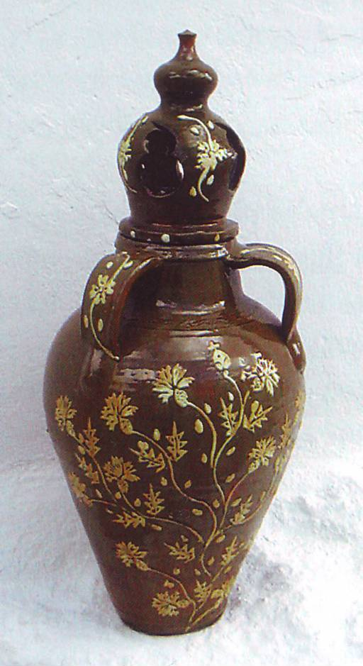 Olla decorada y esmaltada, llamada olla de novia por ser regalada por el novio a su prometida como símbolo de compromiso y fecundidad. Pieza tradicional de la alfarería toledana, ciudad en la que concurrieron tres importantes culturas: judios, árabes y cristianos. Este ejemplar pertenece al Museo de Cerámica de Chinchilla de Monte-Aragón y forma parte de la colección reunida por las familias Useros y Belmonte, de Albacete, España.